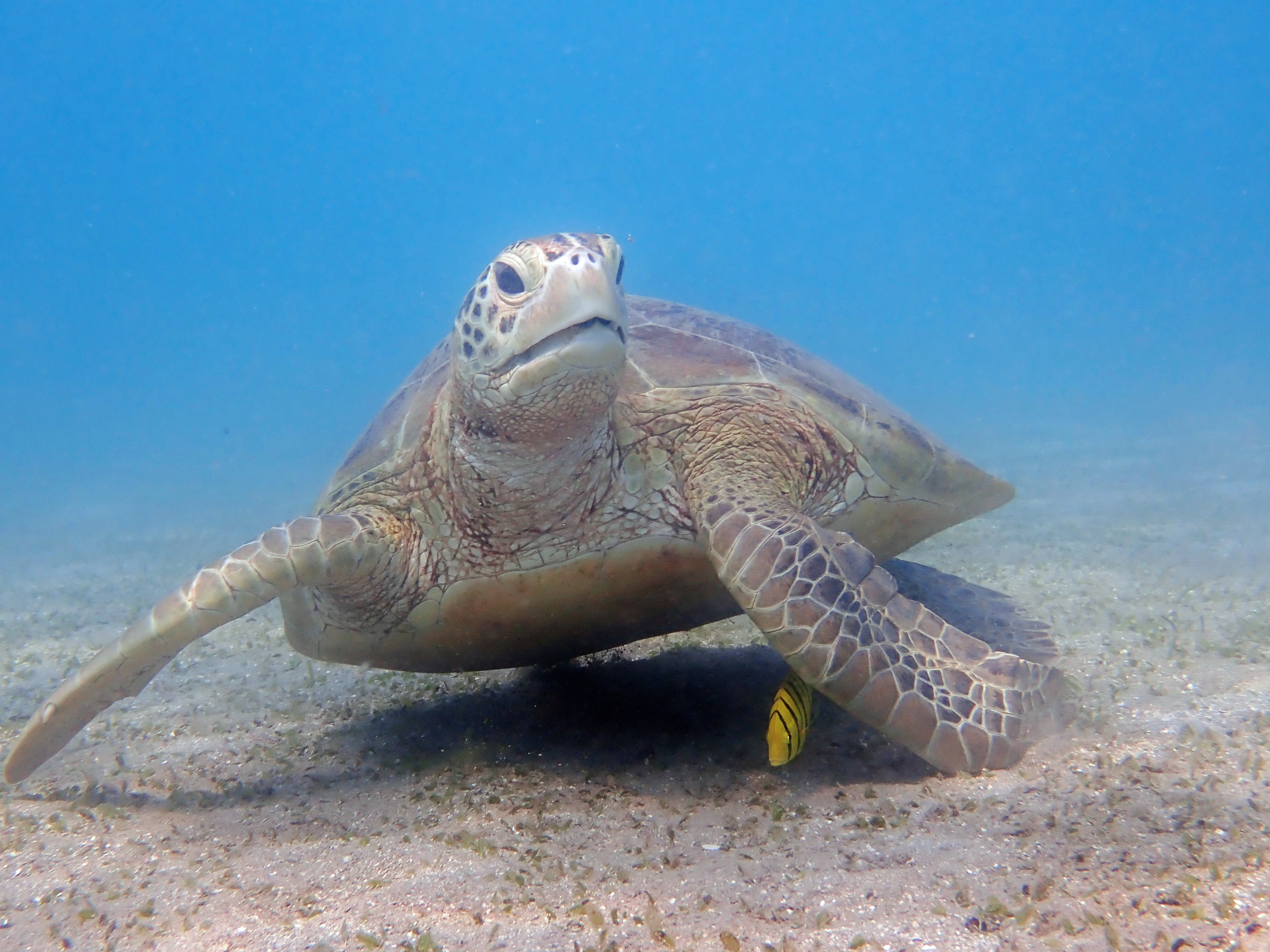 Une tortue verte (Chelonia mydas) en compagnie d'un poisson-pilote (Gnathanodon speciosus) dans la "zone de protection du site naturel de N'Gouja", au sein du Parc naturel marin de Mayotte.